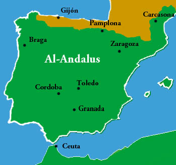 echo por mi con referencias de mapas antiguos, con photo deluxe, y cogiendo un mapa escaneado en blanco como base.